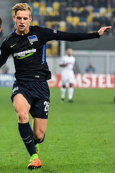 Zorya VS. Hertha BSC 2 - 1